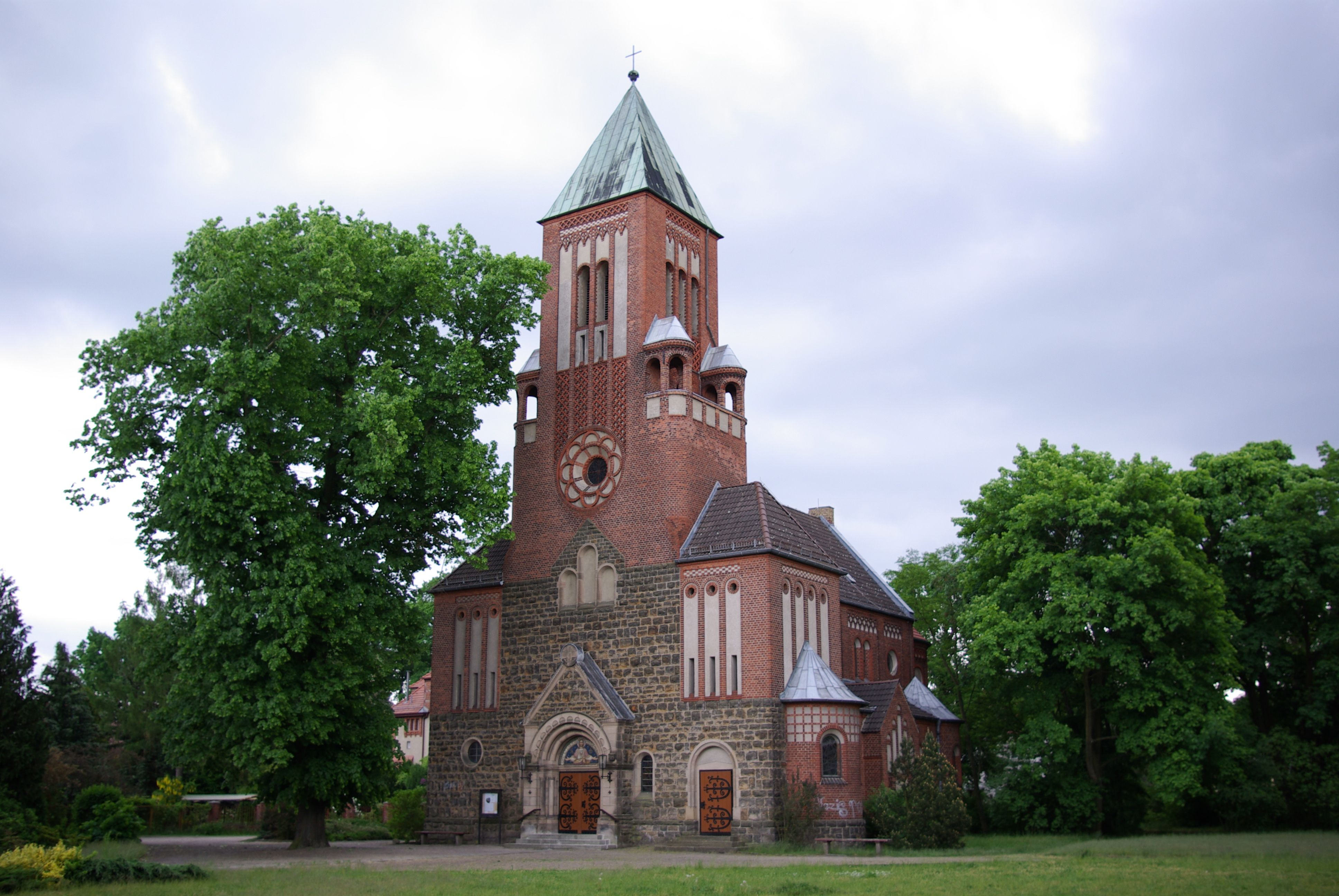 Eichwalde, Brandenburg, Deutschland, die katholische St.-Antonius-Kirche, die Kirche steht auf der Denkmalliste des Landes Brandenburg, Geotags in den Exif Daten